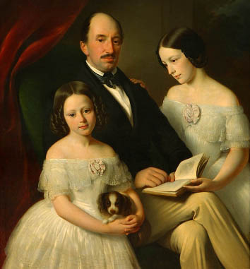 Болеслав Потоцкий (1805—1892) с дочерью Марией (1839-1882), в замужестве Строганова, и воспитанницей Софьей Идль.